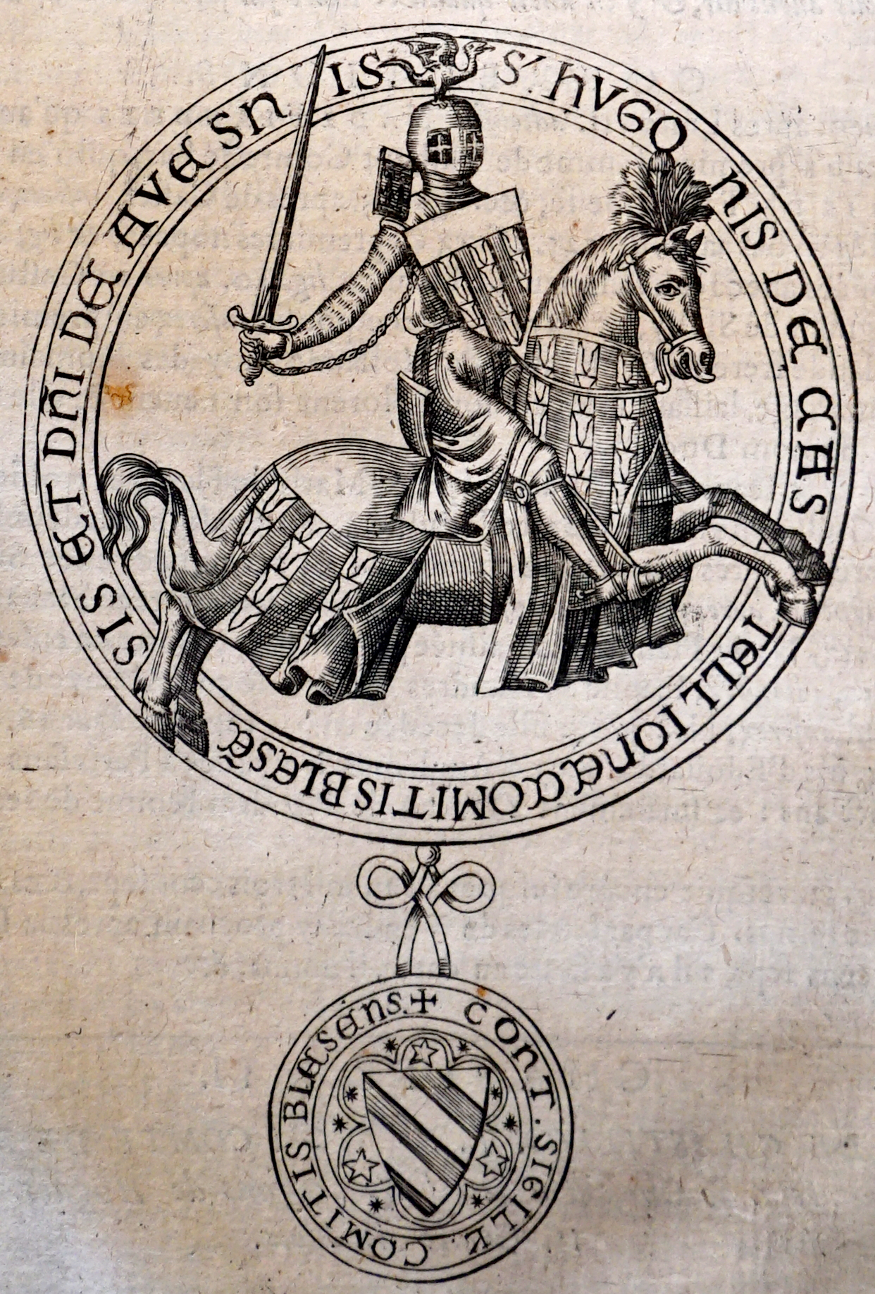 reproduction du sceau de hugues de chatilllon d'avesne .